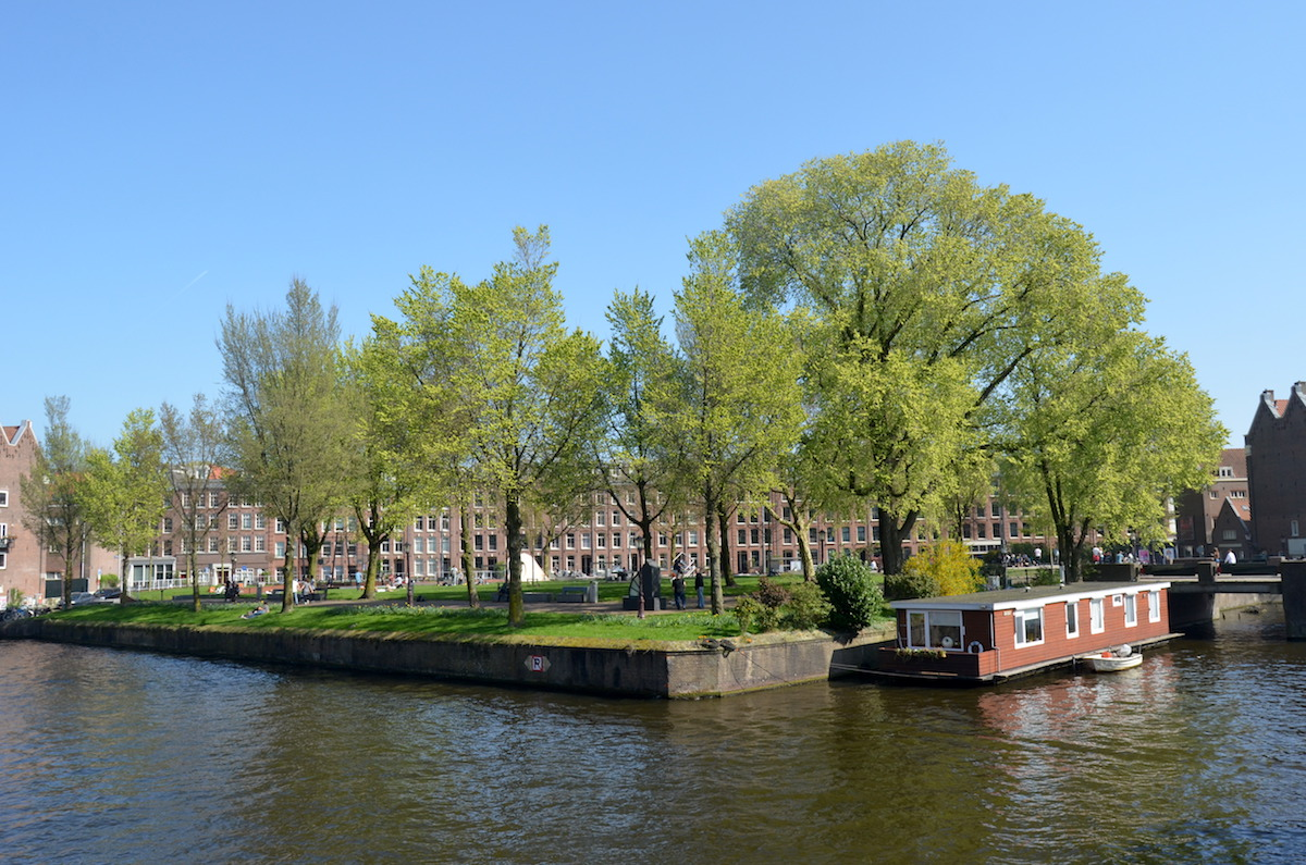 Eerste Marnixplantsoen, gezien vanaf de Singelgracht. In de kademuur is nog de vorm herkenbaar van het vroegere Bolwerk Haarlem. Foto: Erik Swierstra